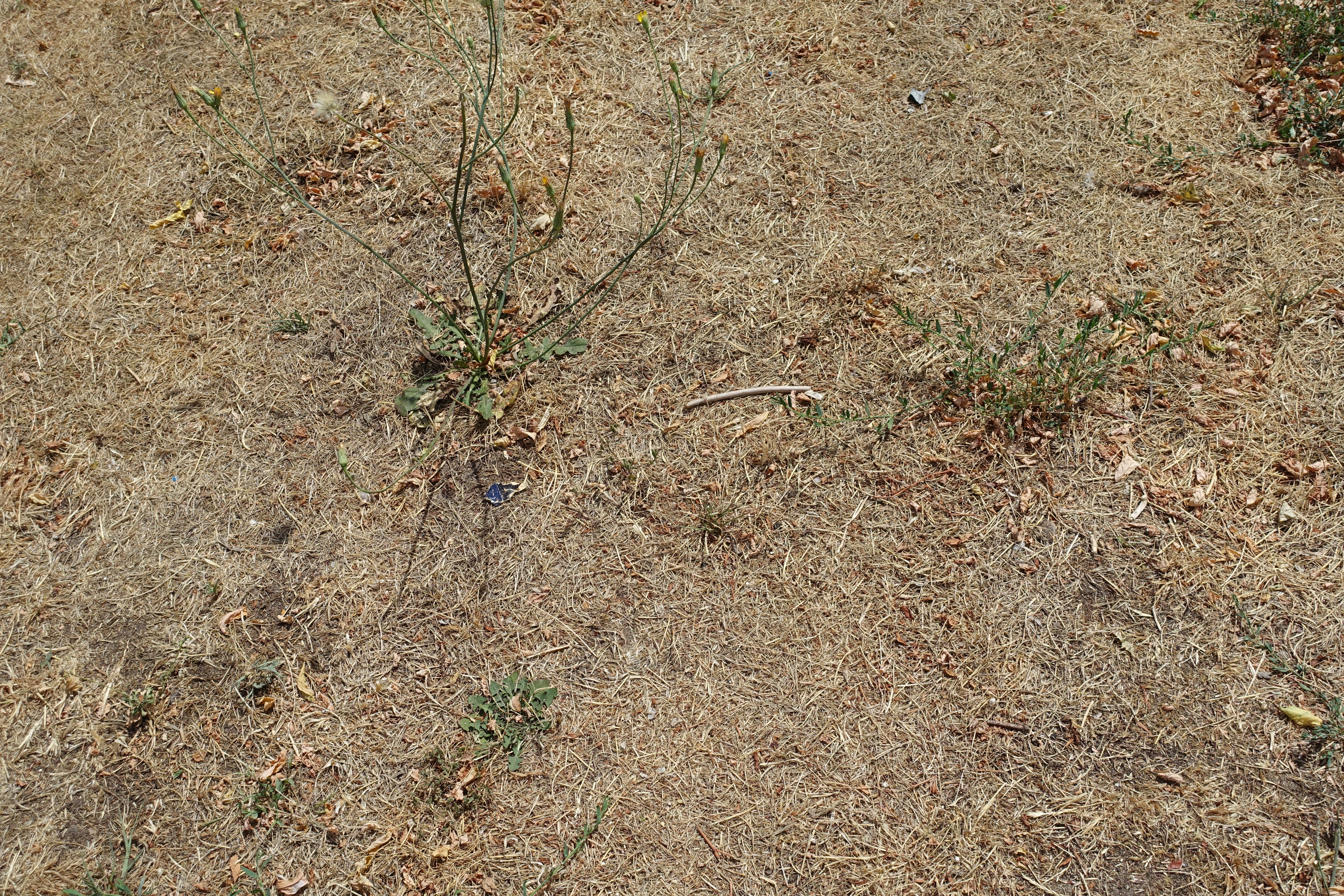 Gevolgen van de hitte in zomer 2018 in Silvolde, in de Achterhoek.